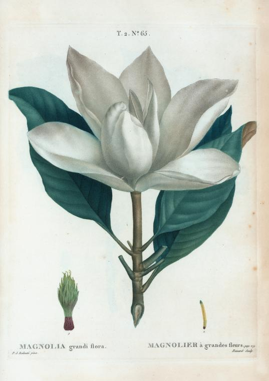 Magnolia grandi flora = Magnolier à grandes fleurs.